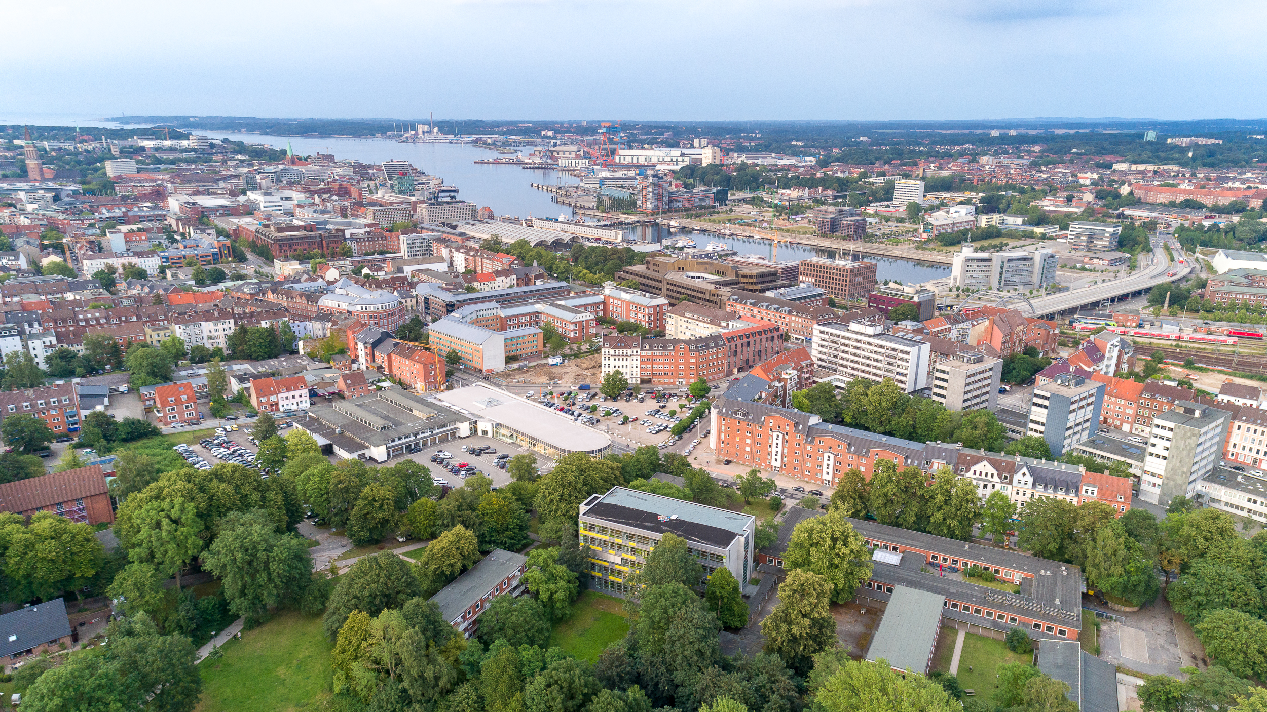 Die Kieler Förde von der Moorteichwiese aus gesehen (Luftaufnahme). Blickrichtung: Nordosten.